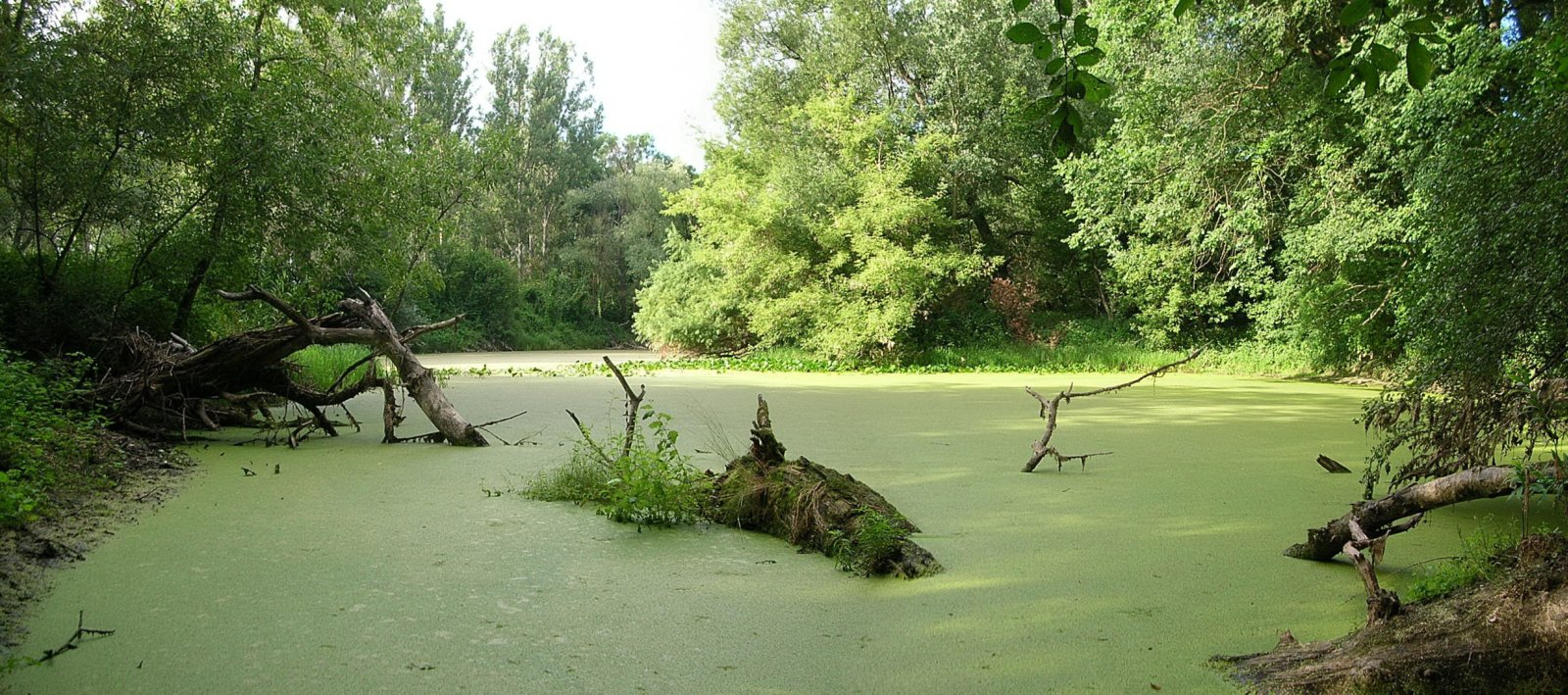 Wielka Kępa Ostromecka k. Bydgoszczy